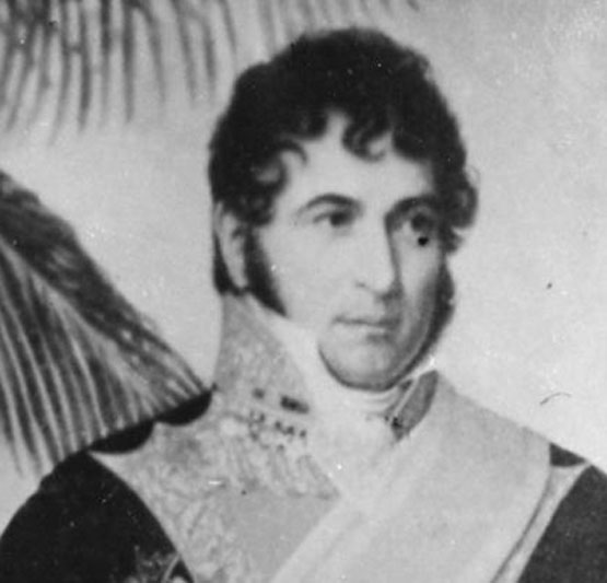 Portrait of Spanish Marshall Miguel de la Torre (1786-1843) Retrato del mariscal español Miguel de la Torre y Pando (1786-1843)